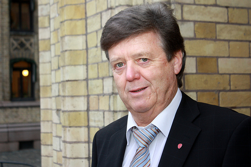 Svein Gjelseth